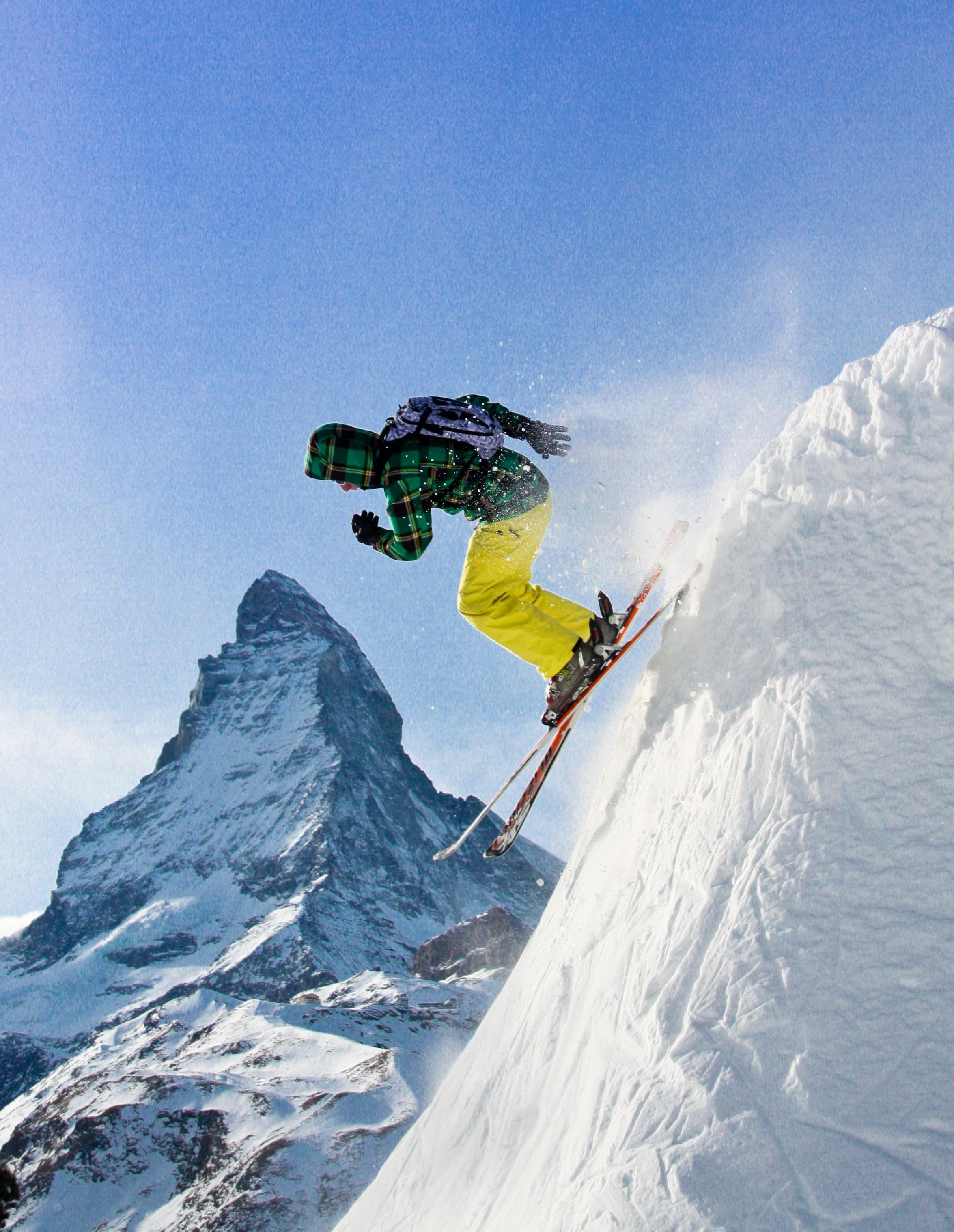 Skiing near Zermatt